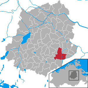 Altentreptow, Landkreis Demmin, Mecklenburg-Vorpommern